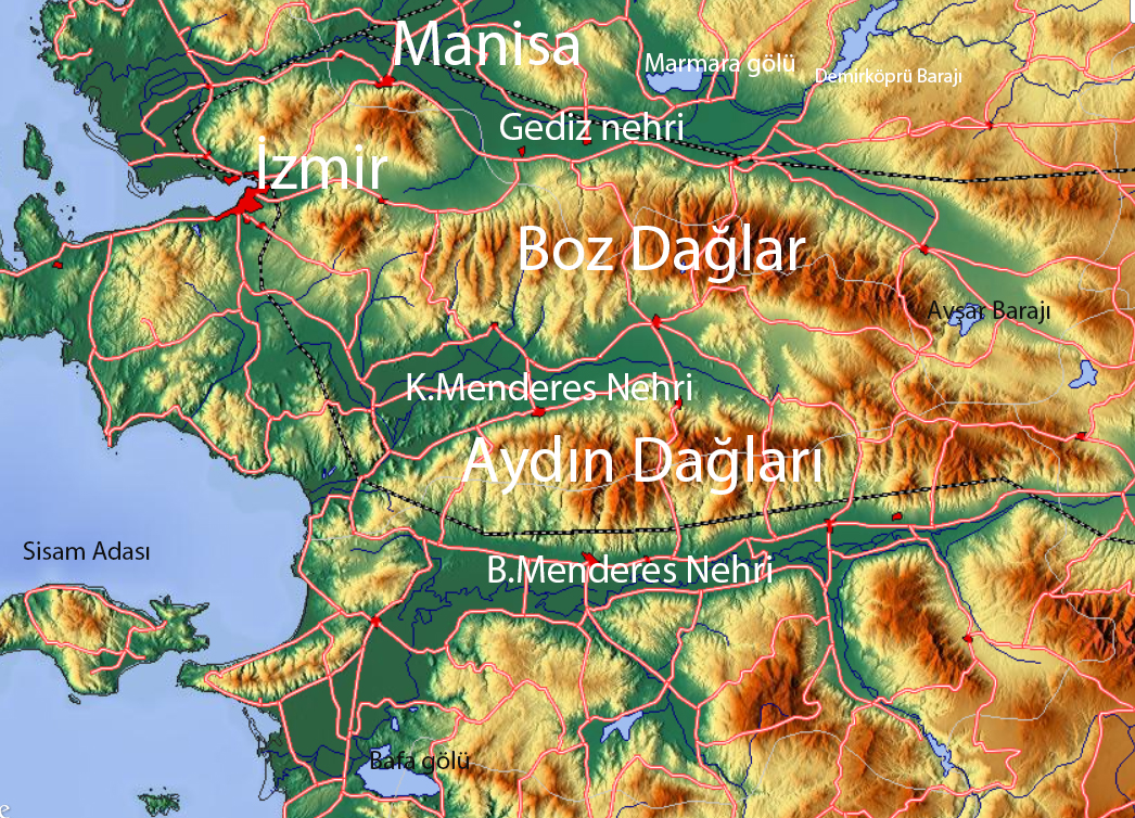 Aydın dağları ve Boz dağlar ile yakın çevresinin topoğrafik haritası.